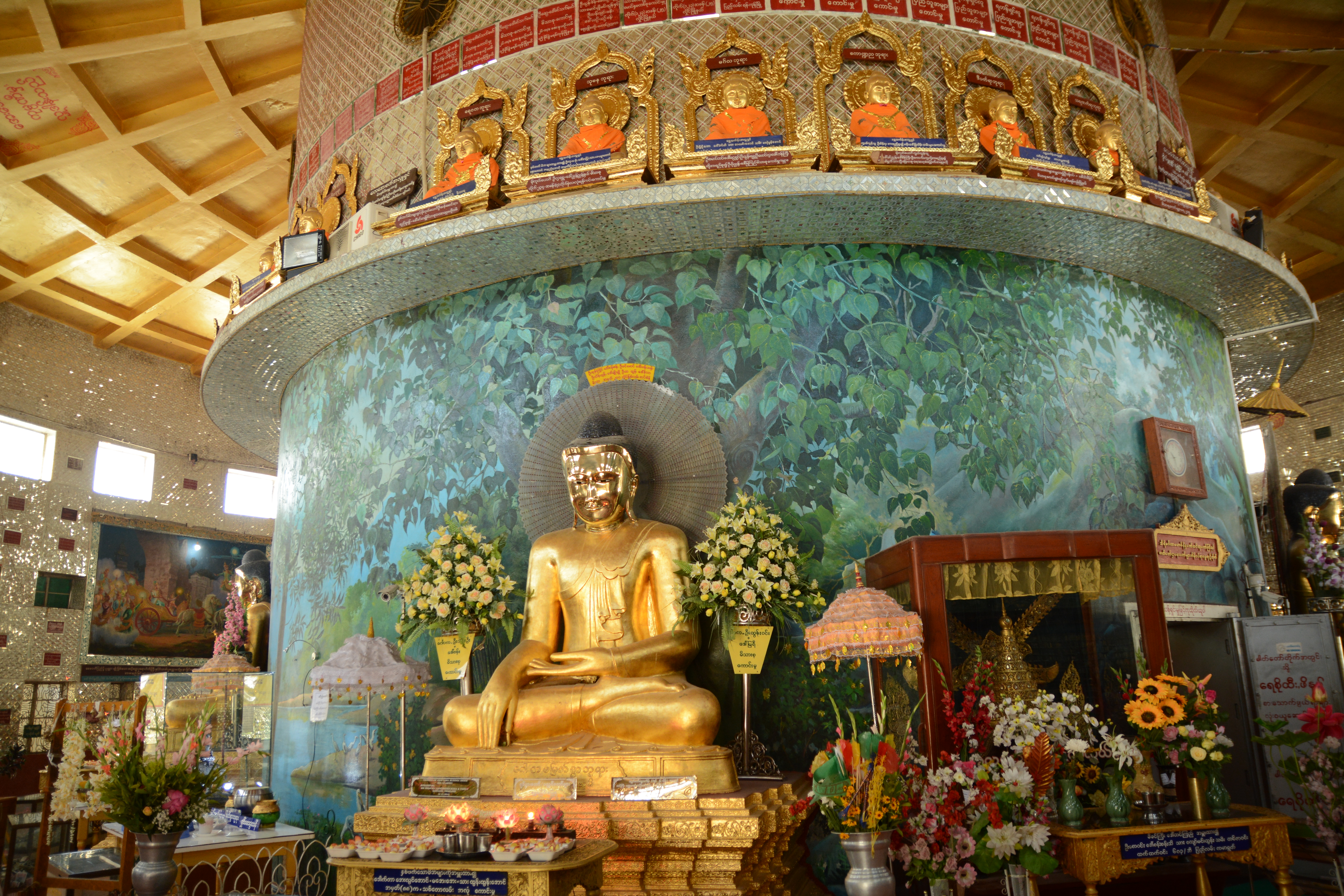 Kaba Aye Paya